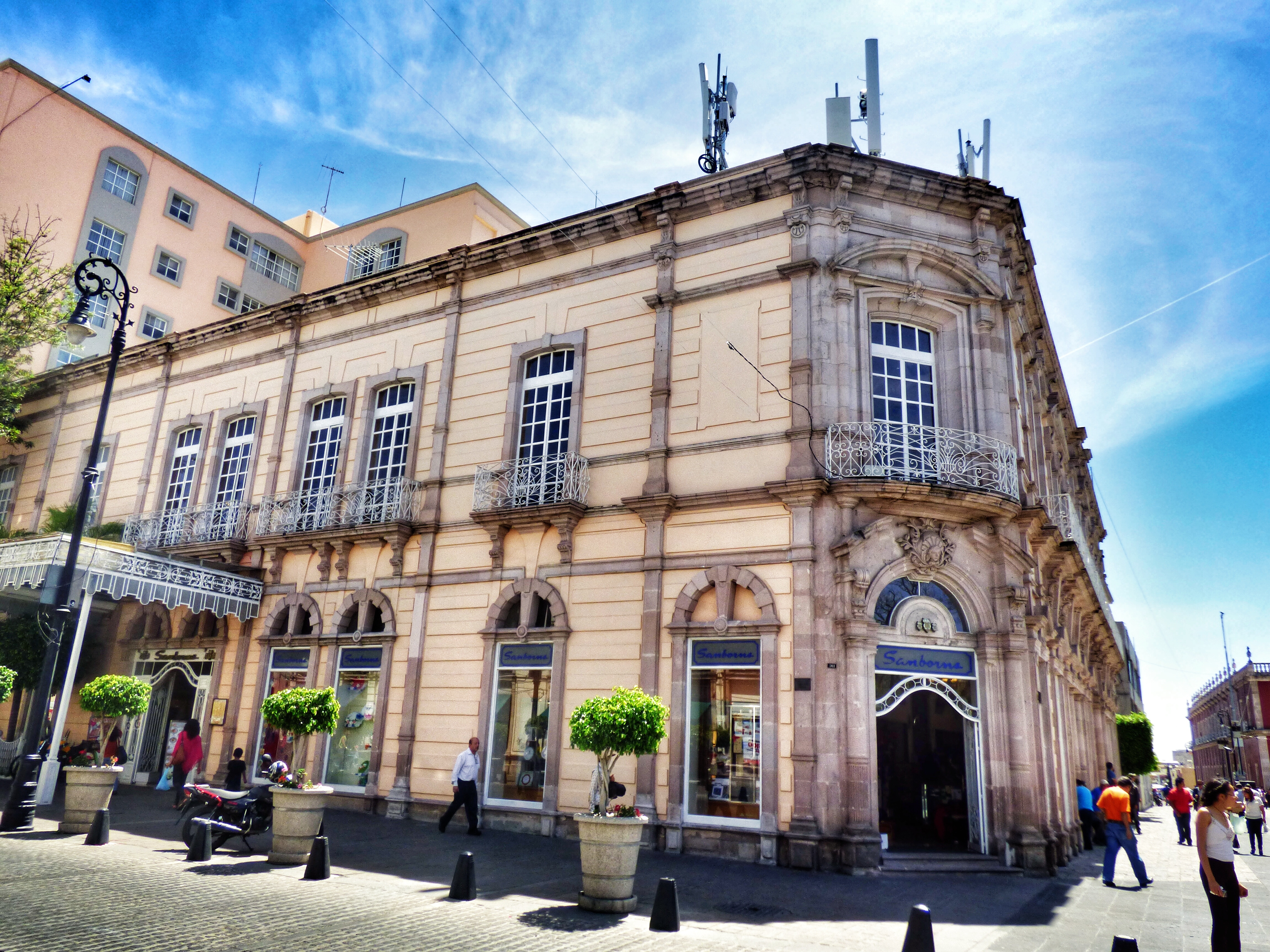 Obra de Refugio Reyes Rivas